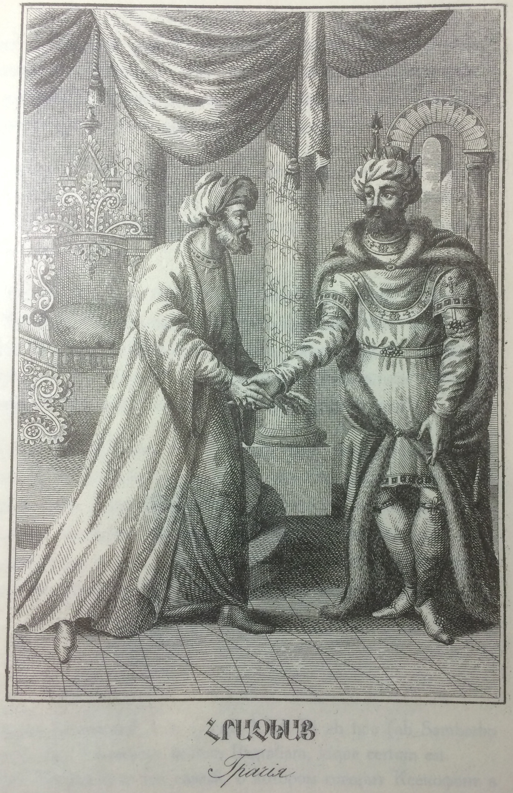 Հրաչյա Հայկազունի